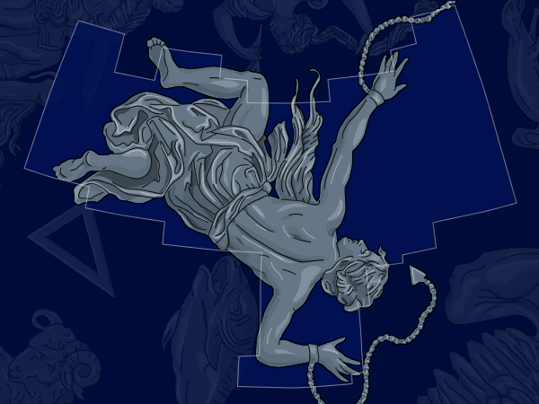 Illustration zum Sternbild Andromeda. Vorlage ist das Original von Johannes Hevelius (1611-1687).